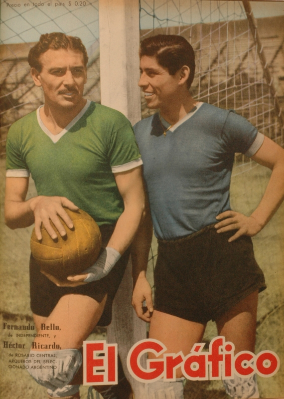 Fernando Bello (Independiente) y Héctor Ricardo (Rosario Central), arqueros de la Selección Argentina durante el Campeonato Sudamericano 1945.